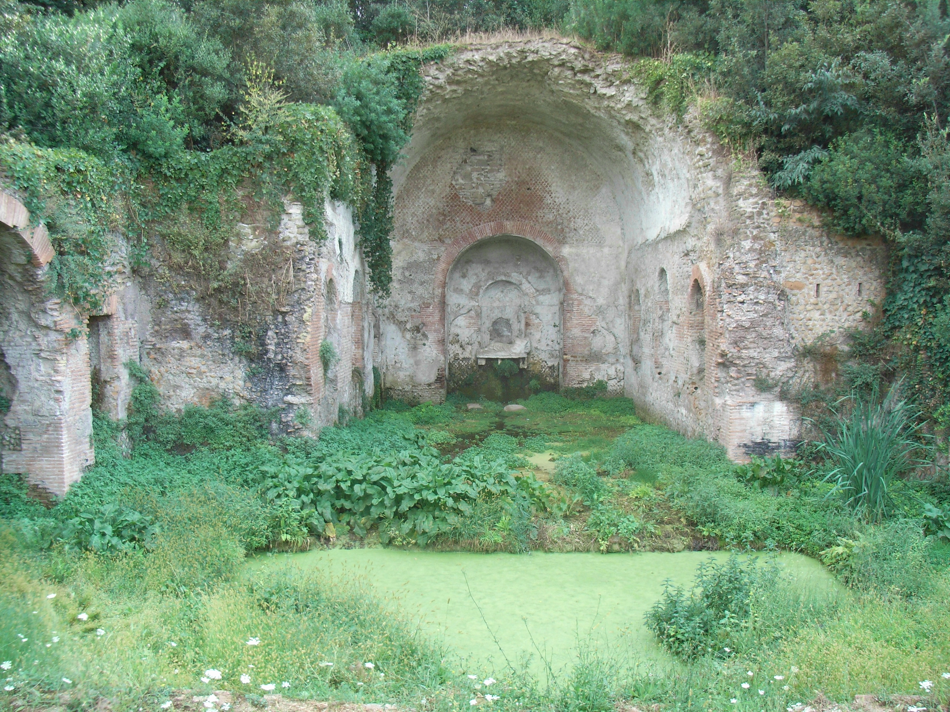 Parco della Caffarella Ranger